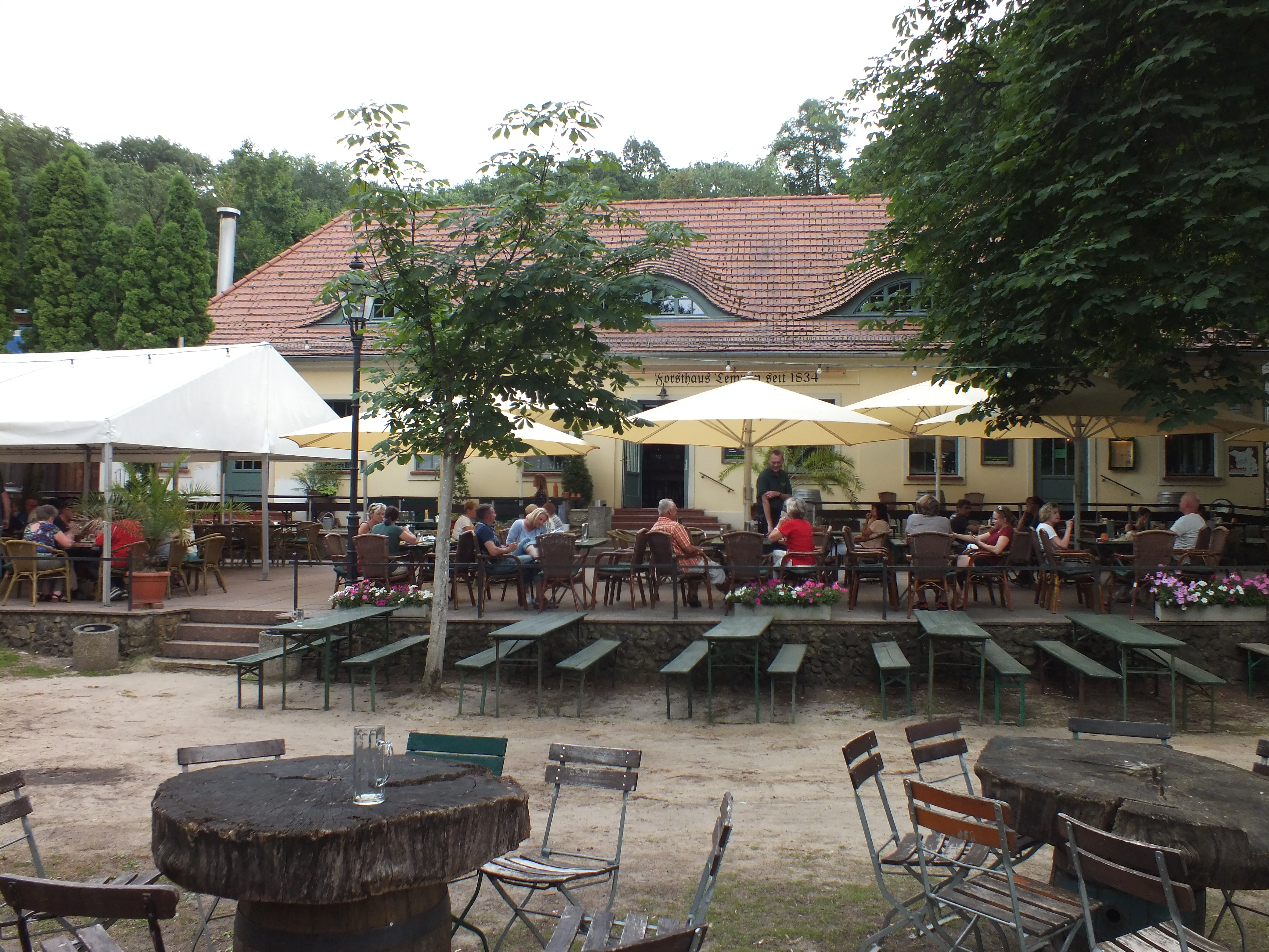 Brauereimanufaktur ‚Forsthaus Templin’